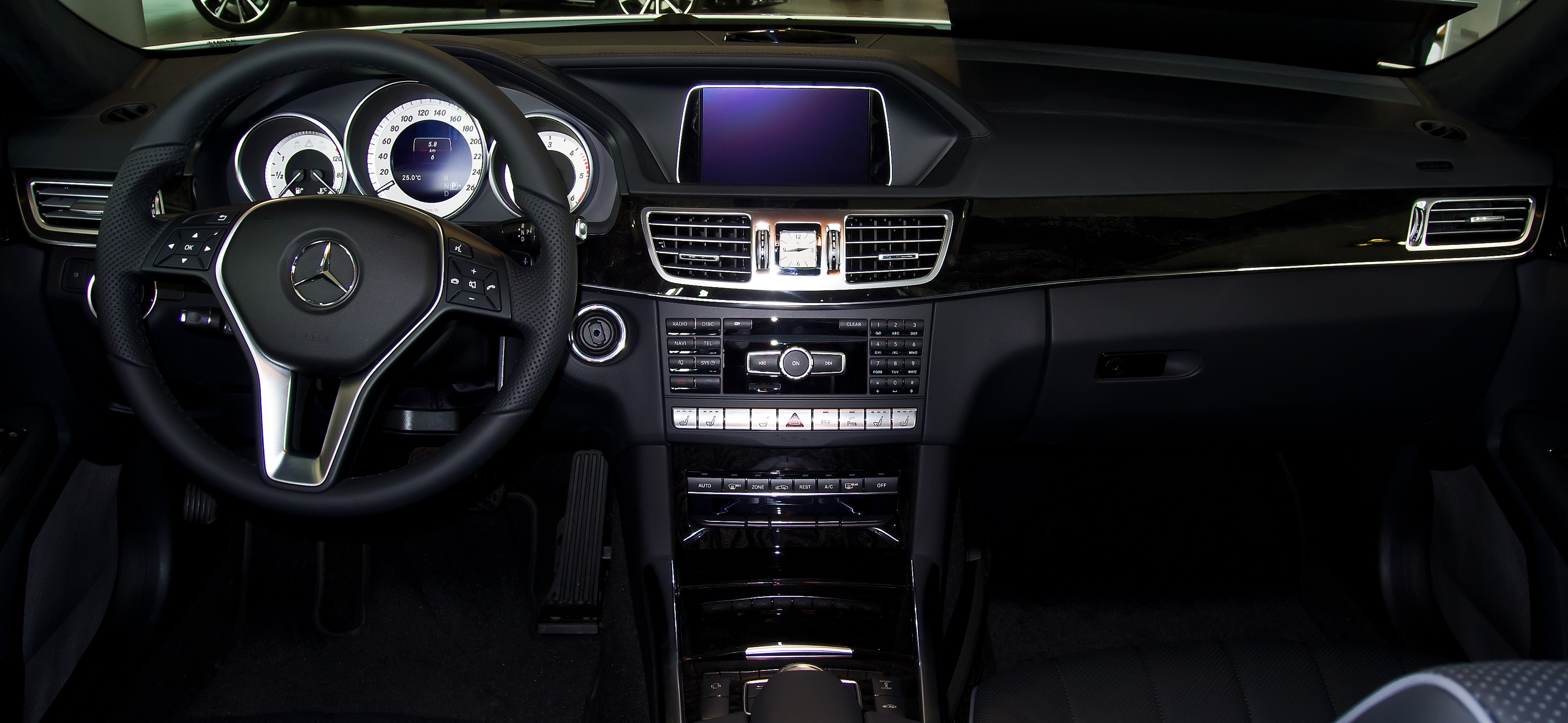 Mercedes-Benz E 350 BlueTEC T-Modell Avantgarde (S 212, Facelift)